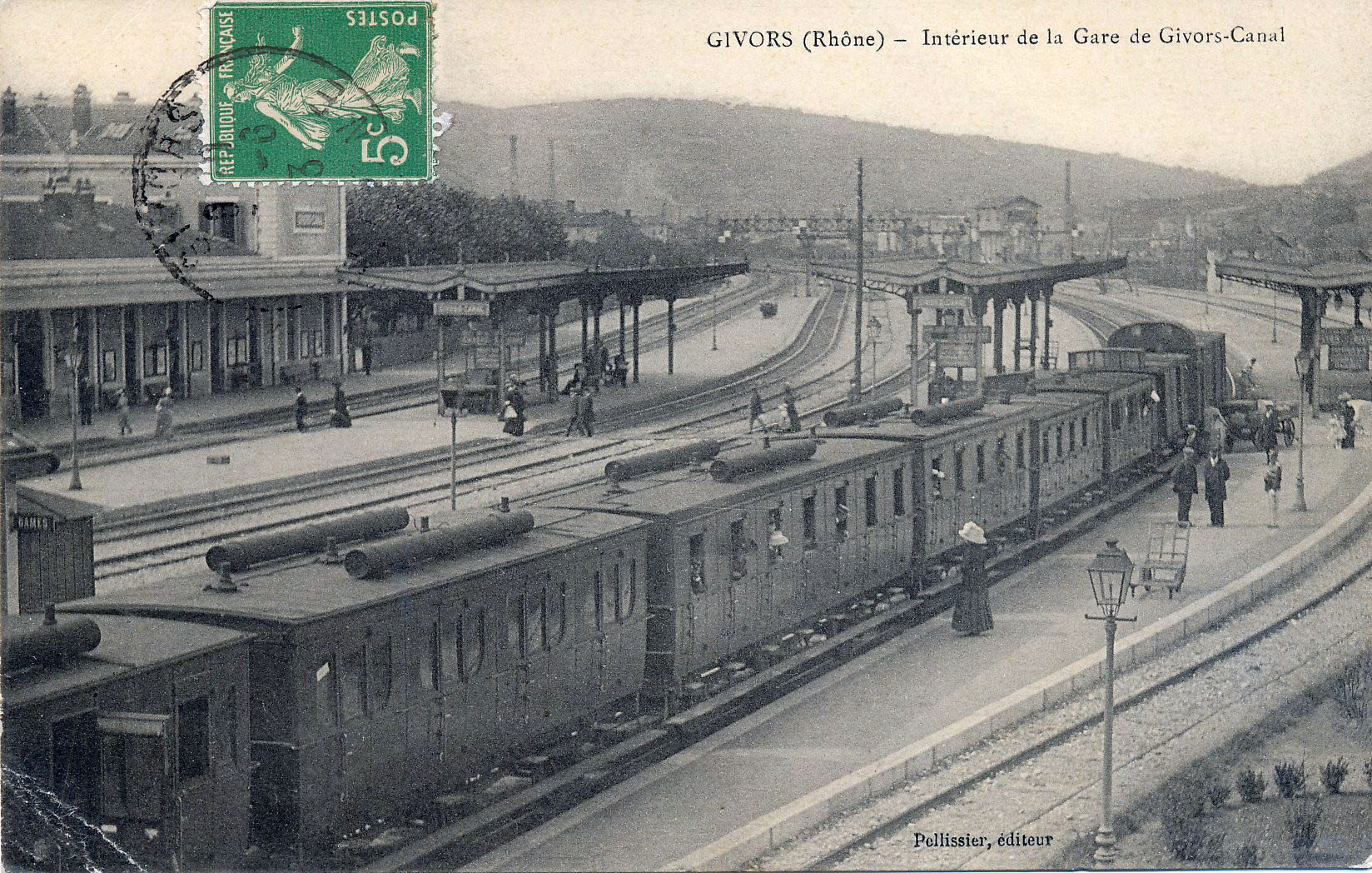 Gare de Givors-Canal, env. 1890. Archives municipales de Givors, cote 5Fi 2337- 3